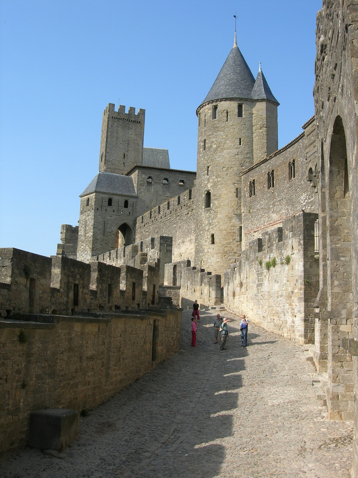 France, Aude (11), Cité de Carcassonne, Porte de l'Aude